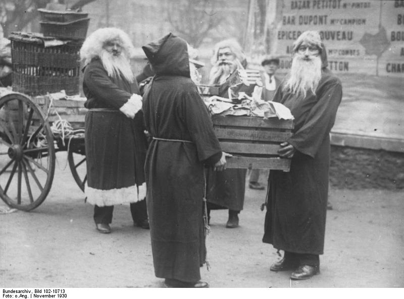 Zum bevorstehenden Weihnachtsfest! Als Weihnachtsmänner verkleidete Pariser Heilsarmee sammelt für die Weihnachtsbescherung der Armen der französischen Hauptstadt.